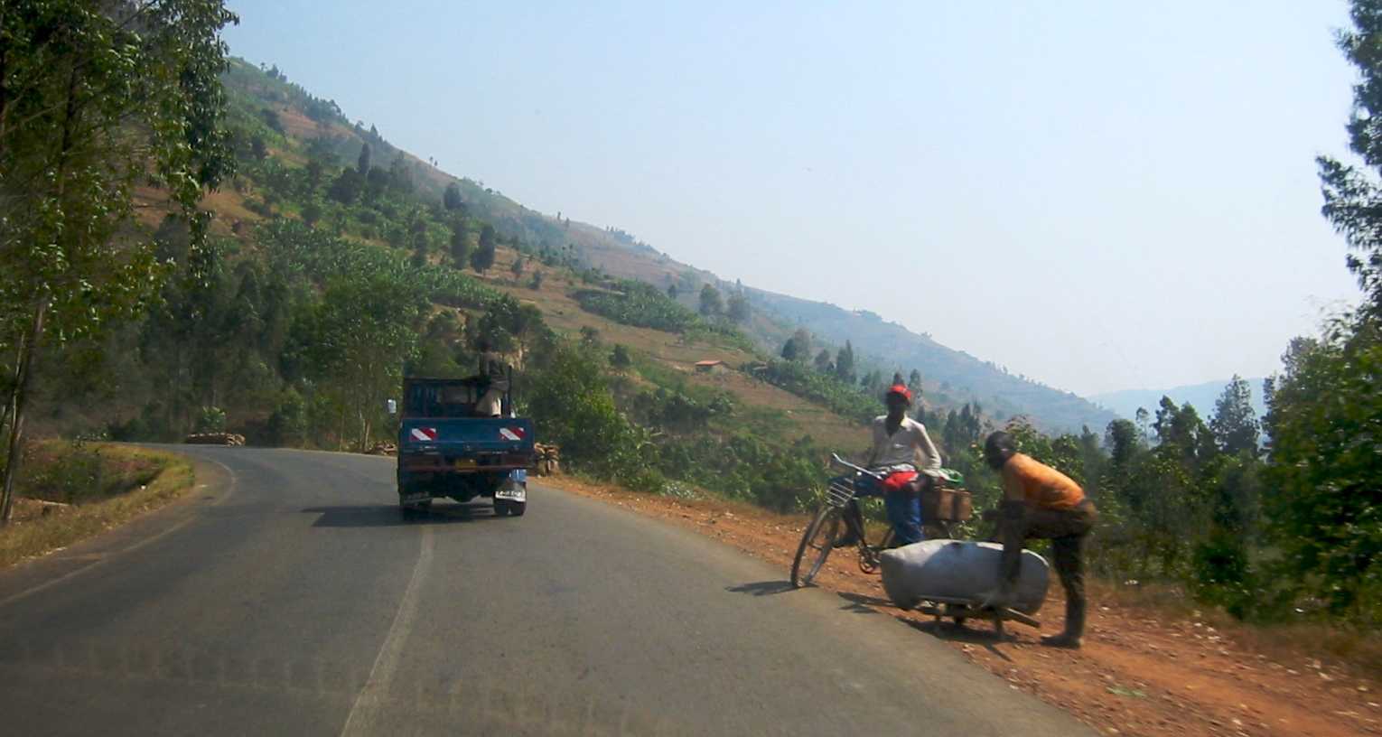 20050803-028-Kigali To Ruhengeri